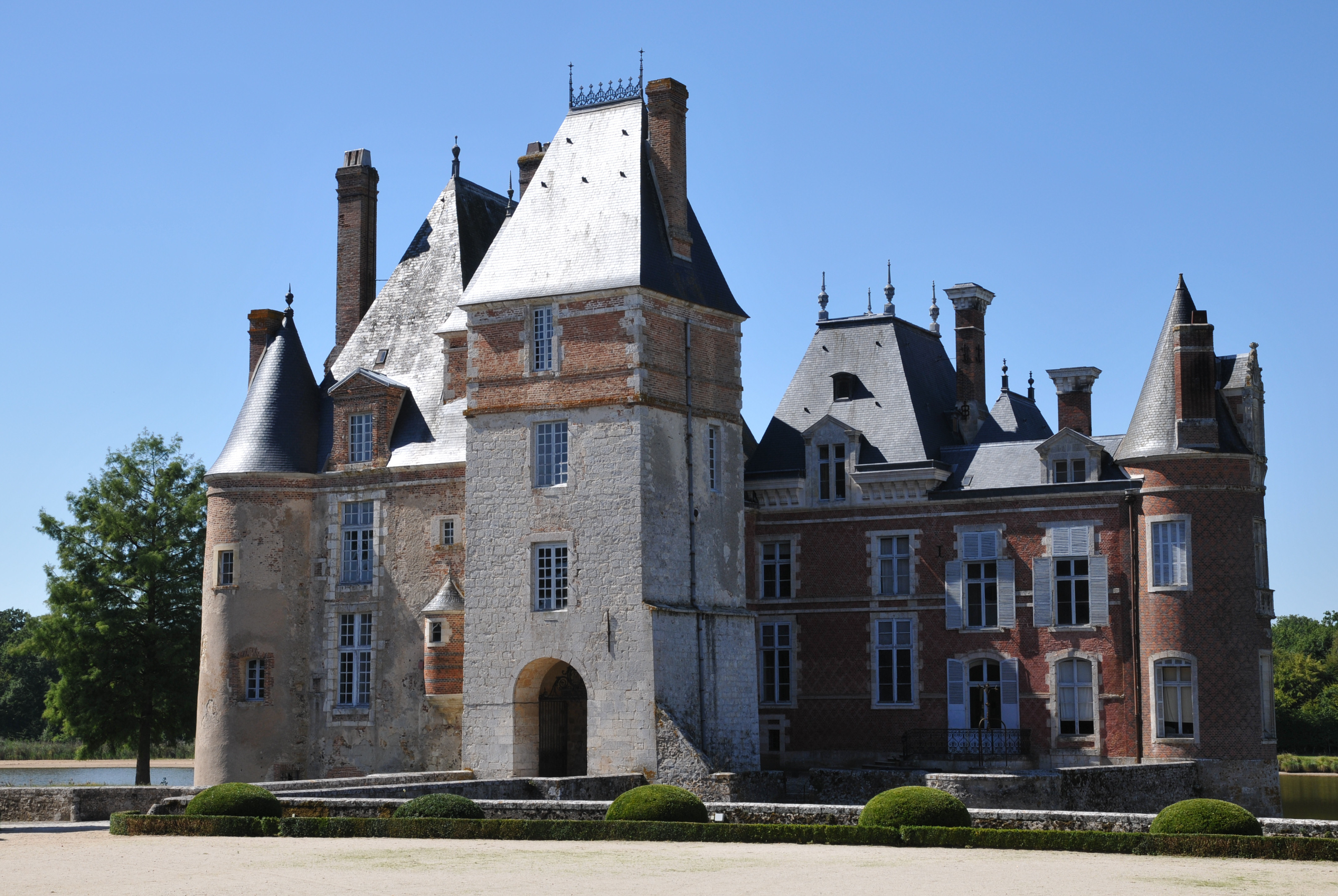 Schloss La Bussière, Nordost-Ansicht